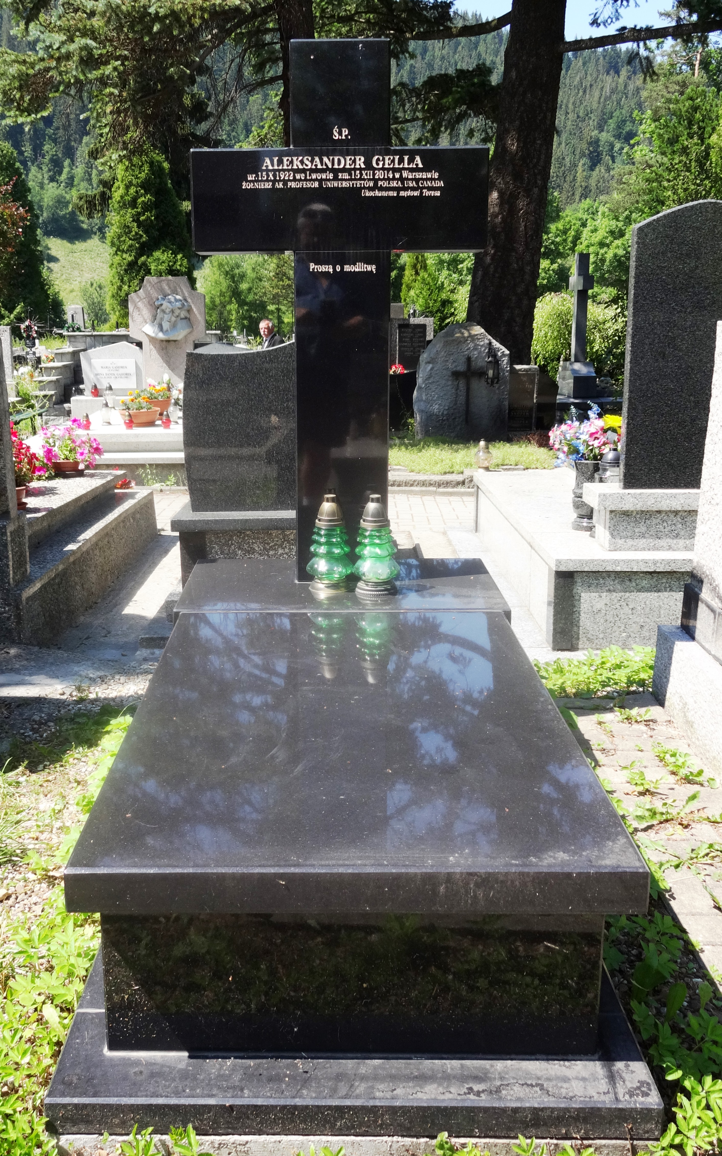 New Cemetery in Zakopane